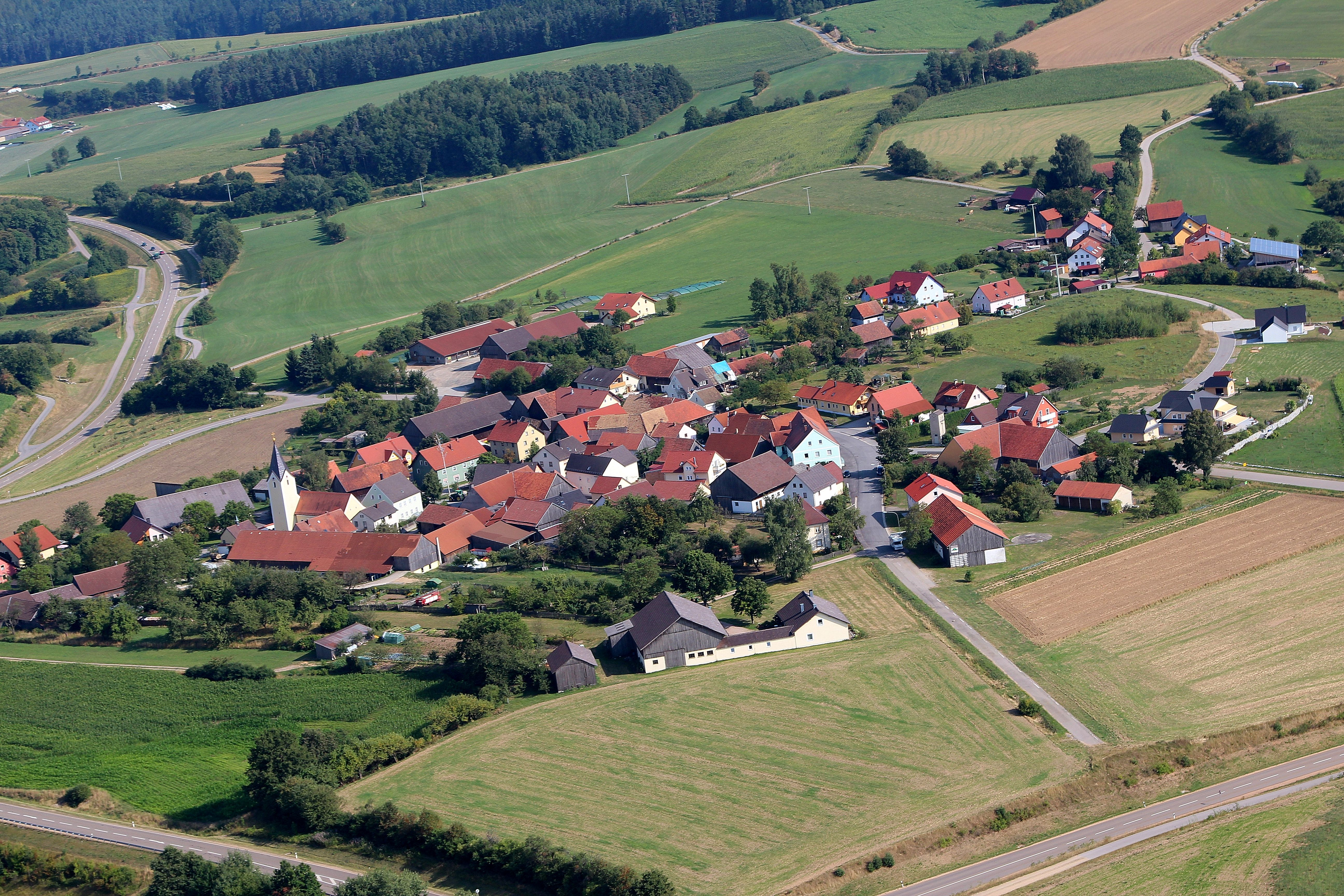 Fuhrn; Neunburg vorm Wald, Landkreis Schwandorf, Oberpfalz, Bayern